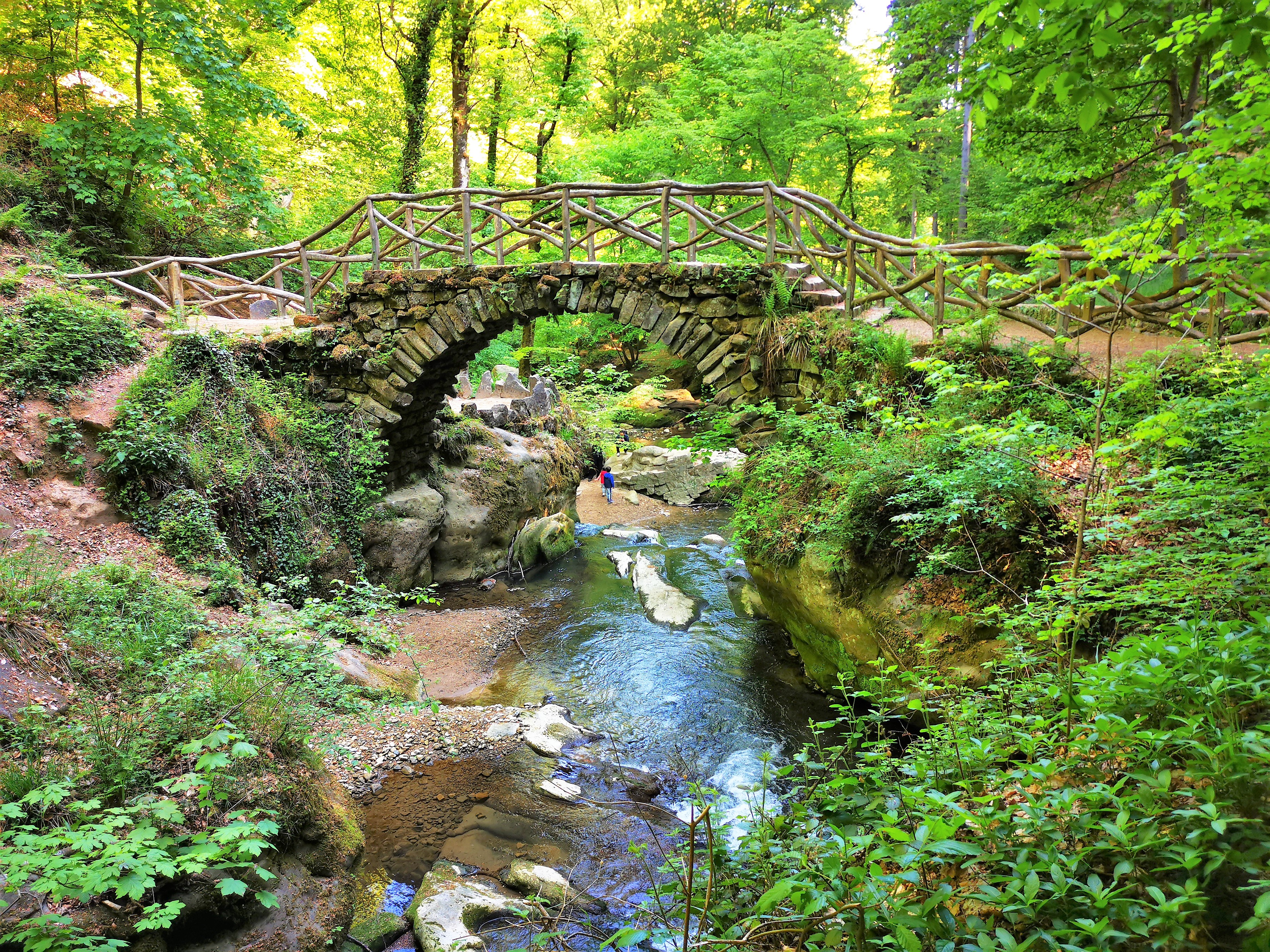 Luxembourg, pont "Schiessentümpel" / "Schéissendëmpel". Le ruisseau Ernz noire fait la limte des communes de Consdorf et de Waldbillig. Vue en direction Nord.